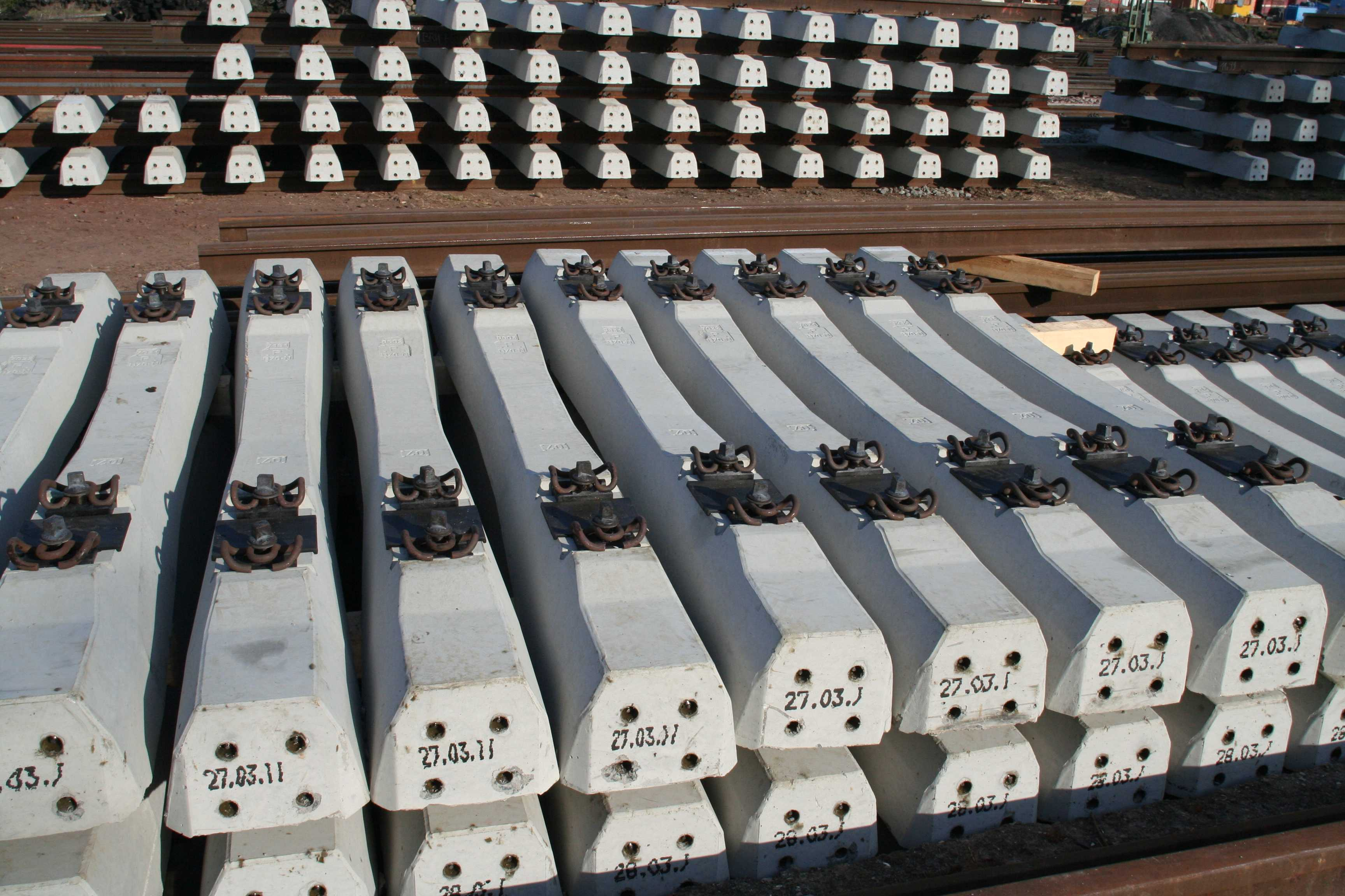 Spannbetonschwelle Typ B70-N in Darmstadt-Kranichstein